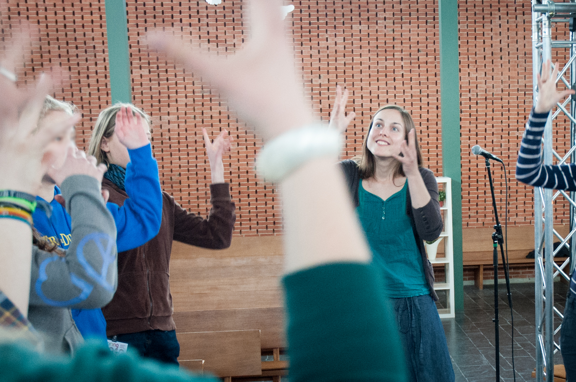 Die Gebärdensprachdolmetscherin Andrea Michelmann beim Einüben eines Lobpreis-Songs in Gebärdensprache mit/durch Teilnehmer des Gemeinde FerienFestivals SPRING 2012 in Willingen (Upland) im Hochsauerland, Hessen, Deutschland.